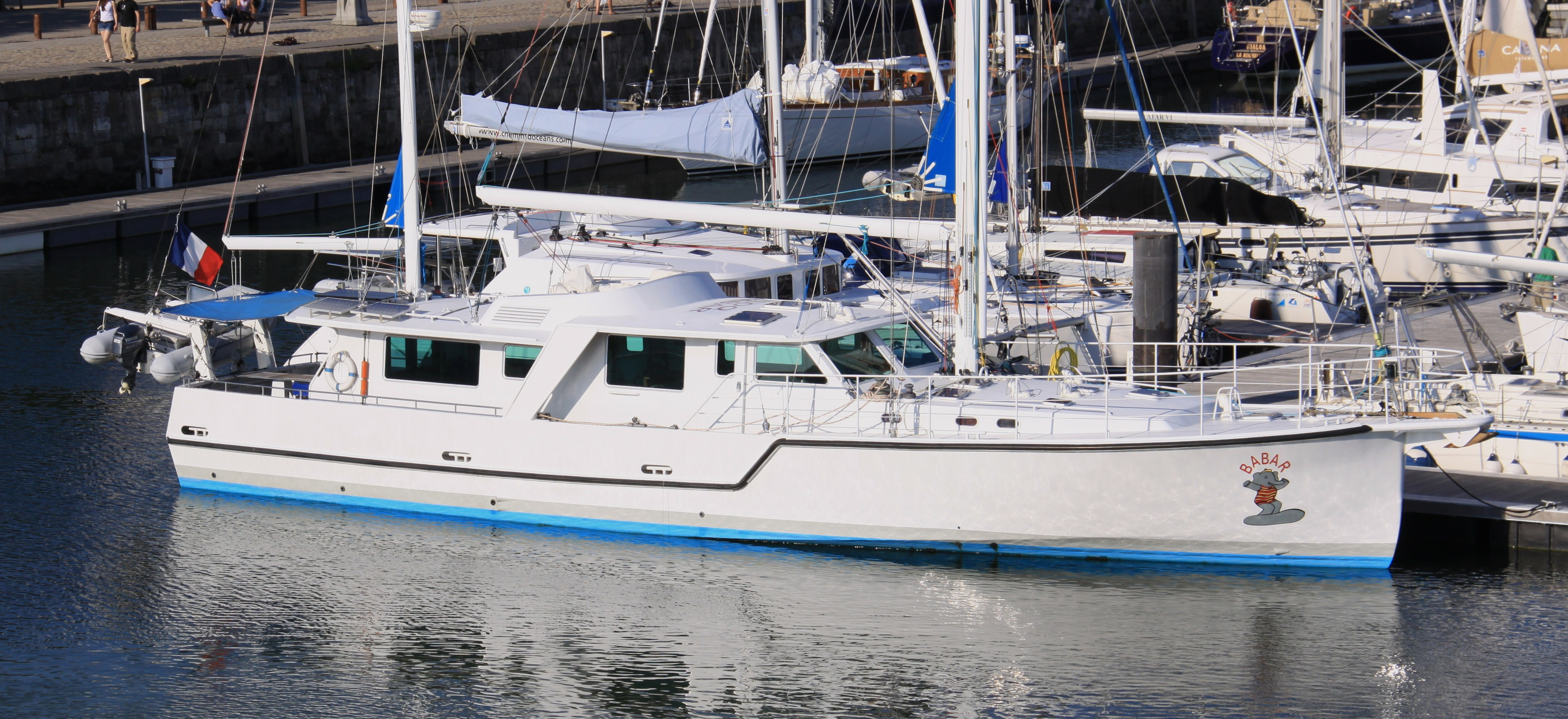 Le yacht mixte "Babar" amarré dans le Bassin des Chalutiers. Ce bateau mixte (motorsailer) permettant la navigation à la voile ou au moteur a été construit en 1997 par le Chantier Gamelin à La Rochelle. Il mesure 20,12 mètres de longueur HT et 4,80 mètres de largeur. Tirant d' eau 2 mètres. Sa coque est en aluminiun. Puissance moteur: 220 kw. Immatriculation: A27173. Indicatif d' appel: FLOQ. MMSI: 228625000. Le "Babar" a été revendu en 2011 pour 470000 euros. Nouveau nom: Aldebaran (La Rochelle). La Rochelle, Charente Maritime, France.